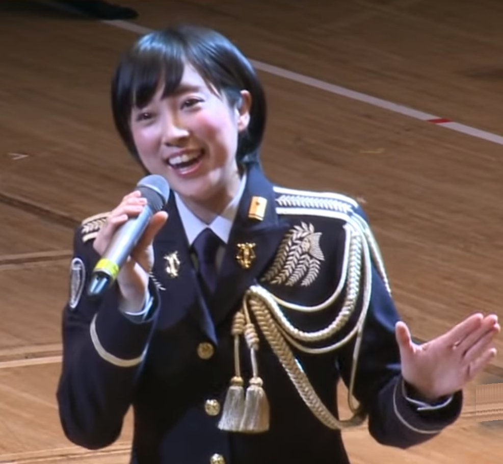 ヒーローを歌っている鶫真衣三曹 2019年1月14日 於兵庫県立芸術文化センター 撮影：陸上自衛隊中部方面隊